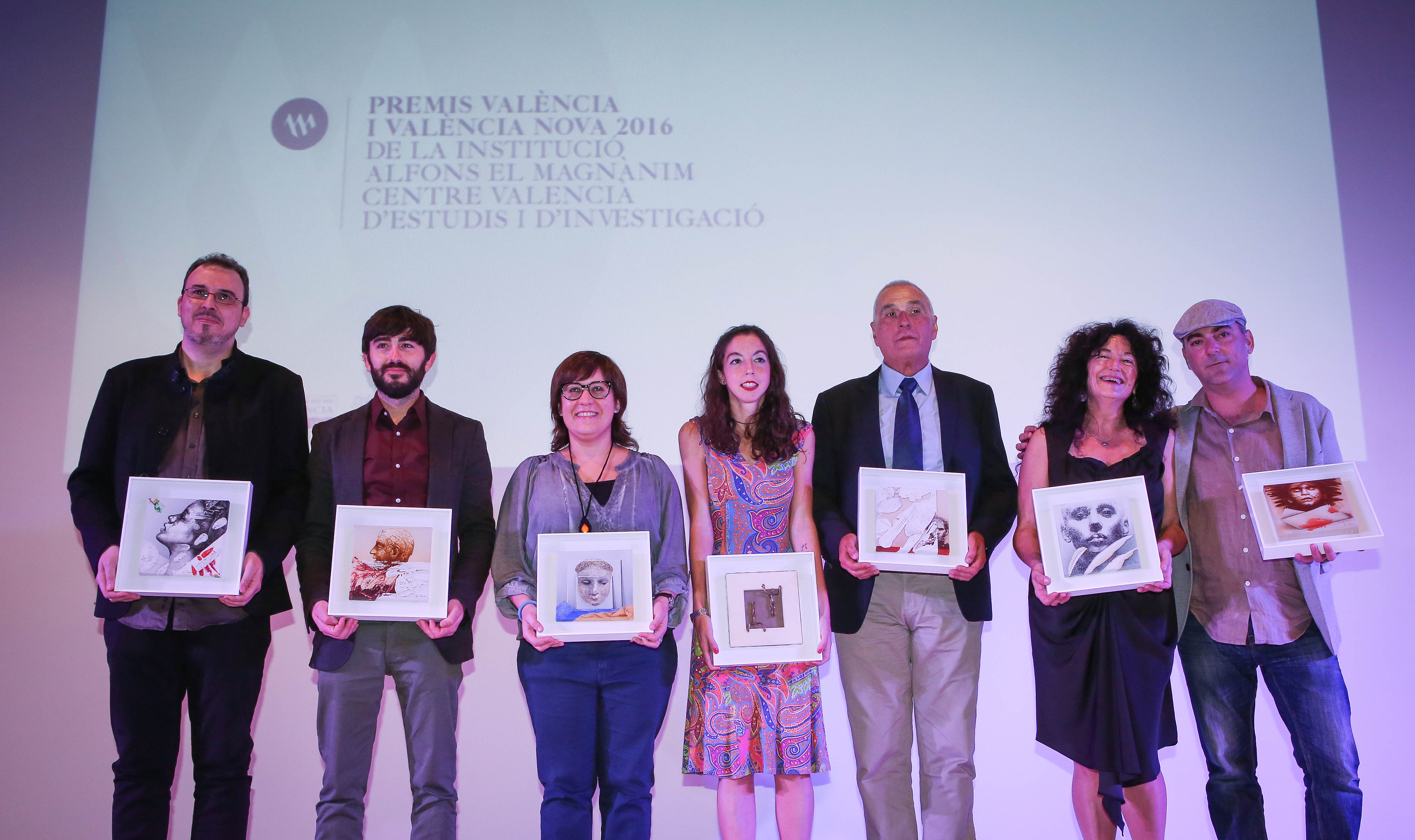 Gala dels premis València 2016 Foto: José Cuellar. Tots els premiats.